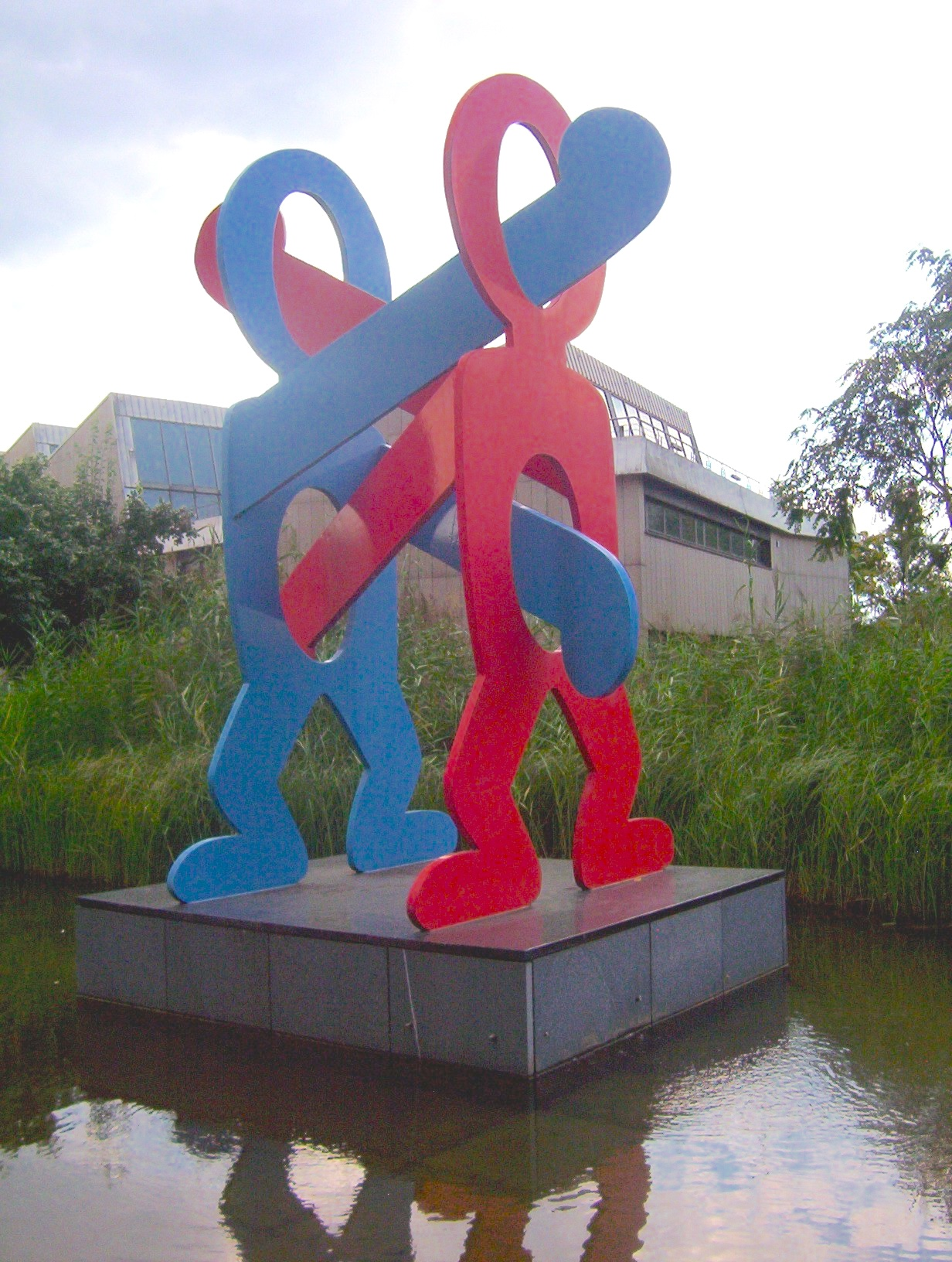 Die Skulptur "Boxer" des Pop-Art-Künstlers Keith Haring in Berlin. Sie befindet sich westlich des Potsdamer Platzes und östlich der Philharmonie.